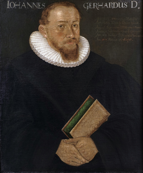 Bildlegende: [Unbekannt:] Porträt von Johann Gerhard, zw. 1616–1619. Öl auf Leinwand. Friedrich-Schiller-Universität Jena, Kustodie, Inv.-Nr. GP 45.